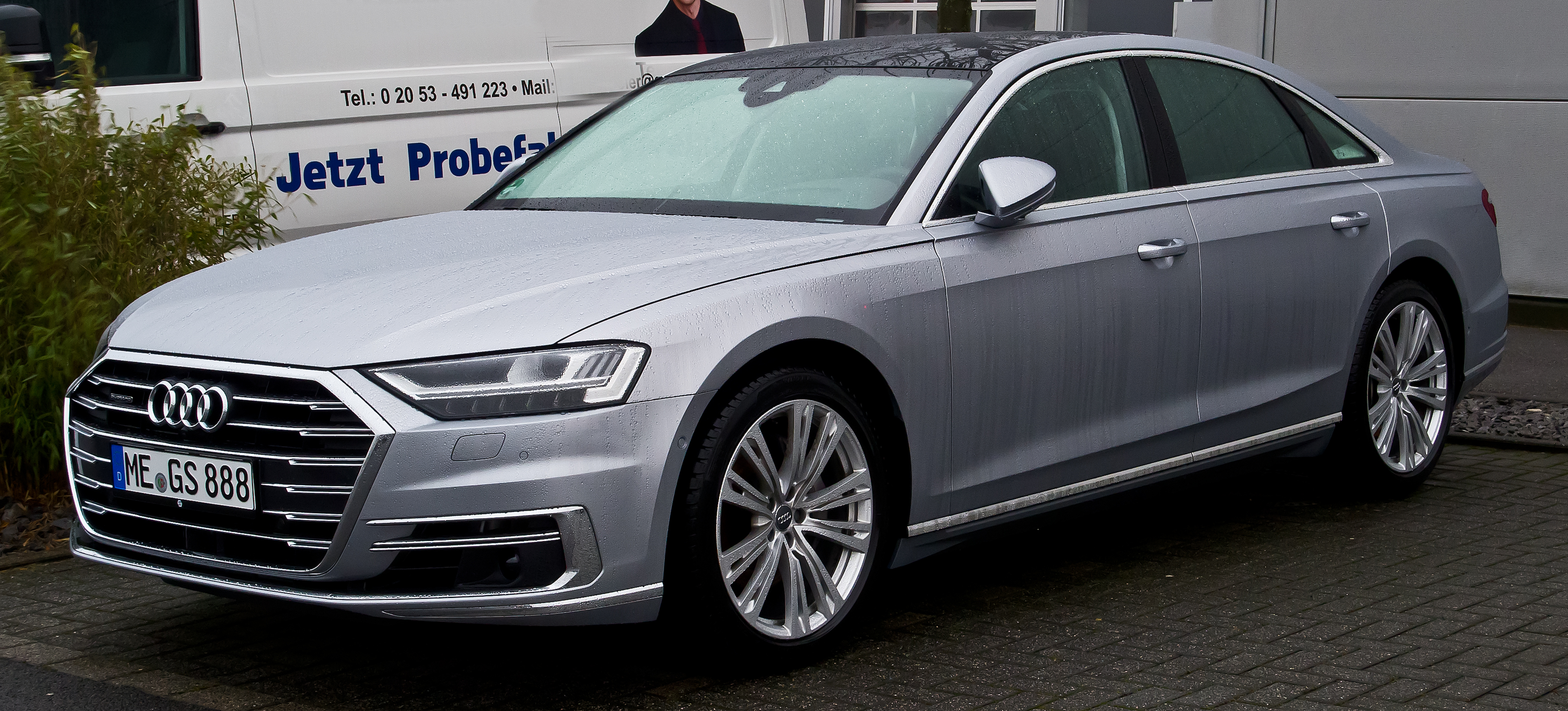 Audi A8 50 TDI (D5)